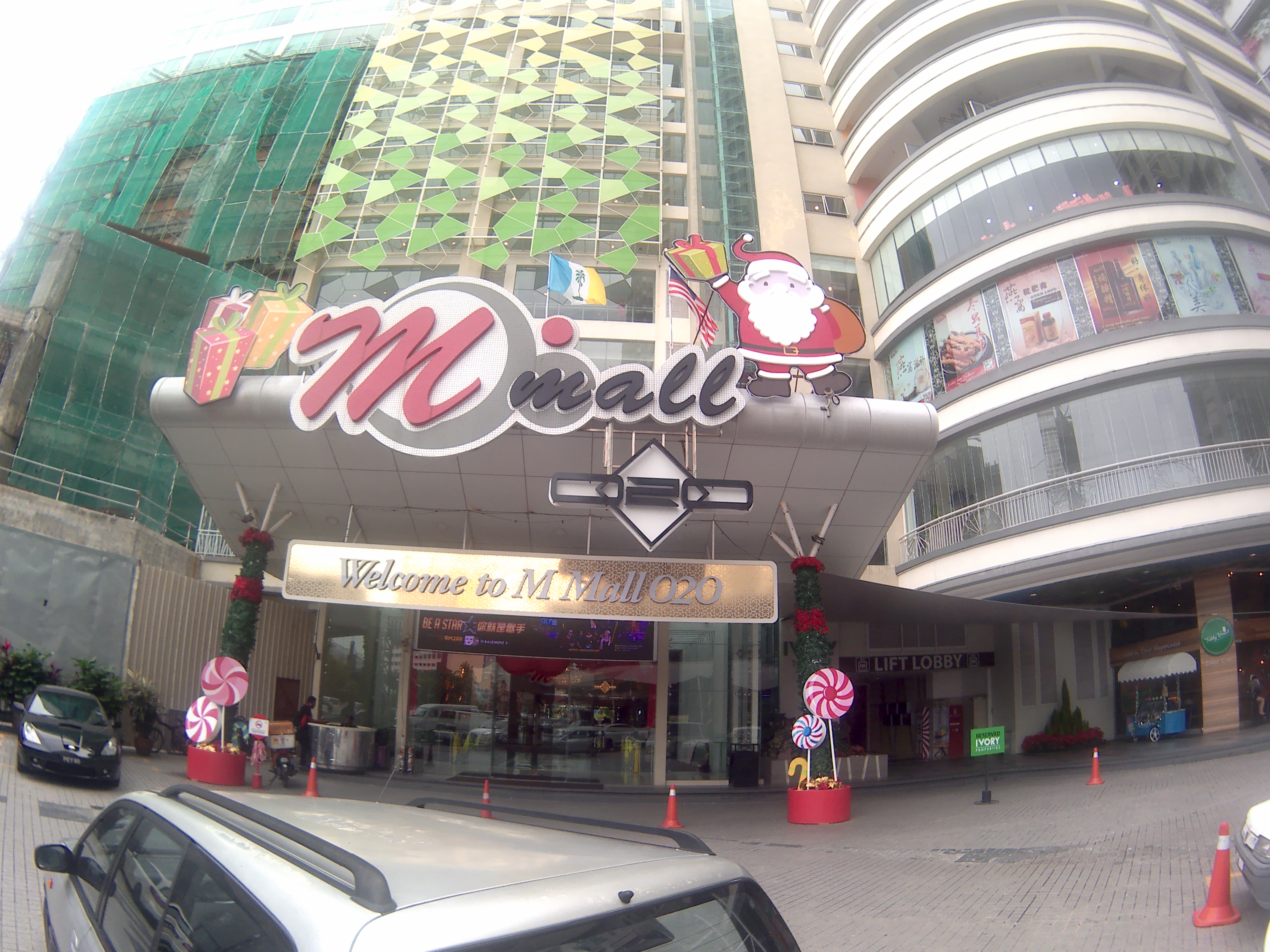 M Mall 020